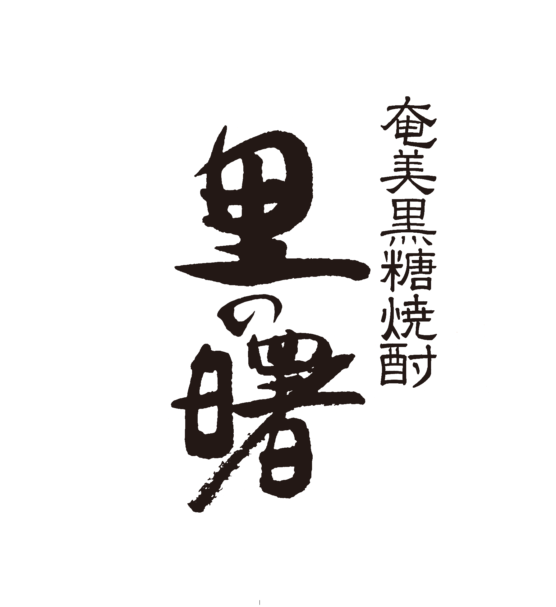 町田酒造のブランド、里の曙のロゴマーク